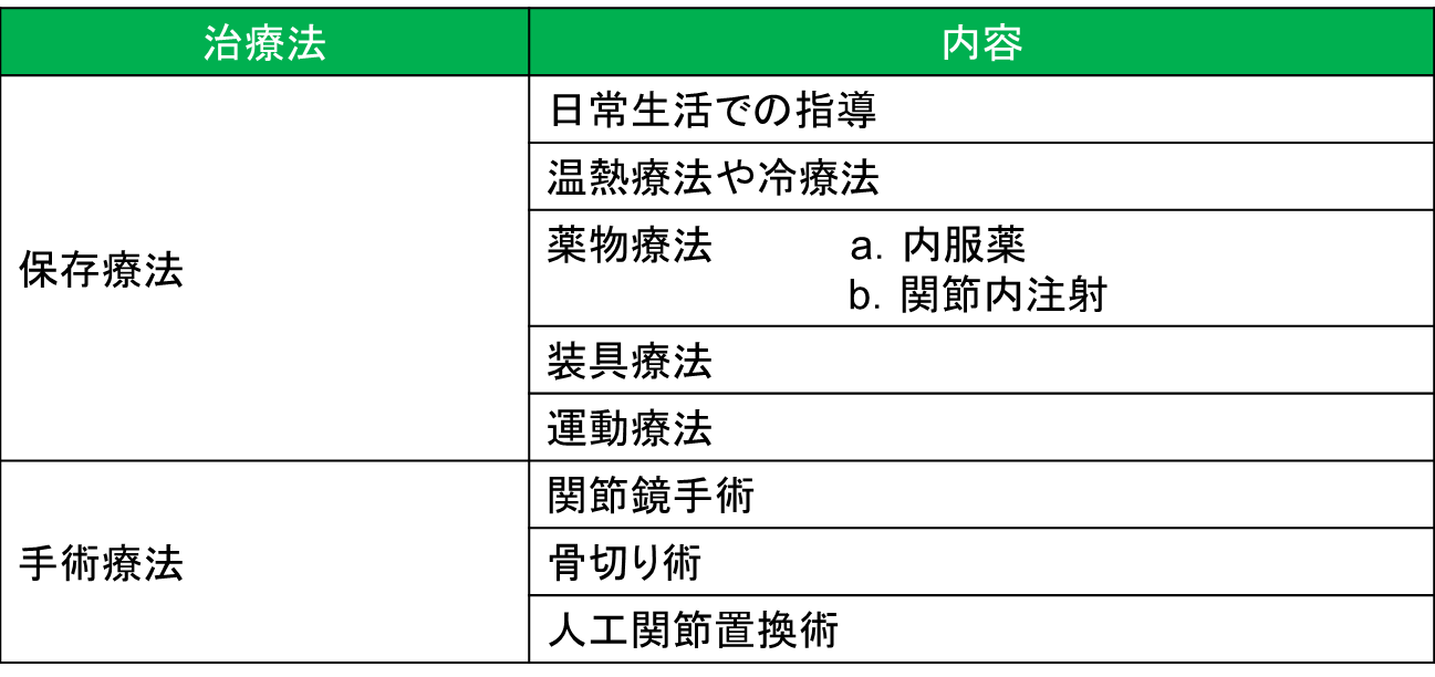 疼痛治療の分類